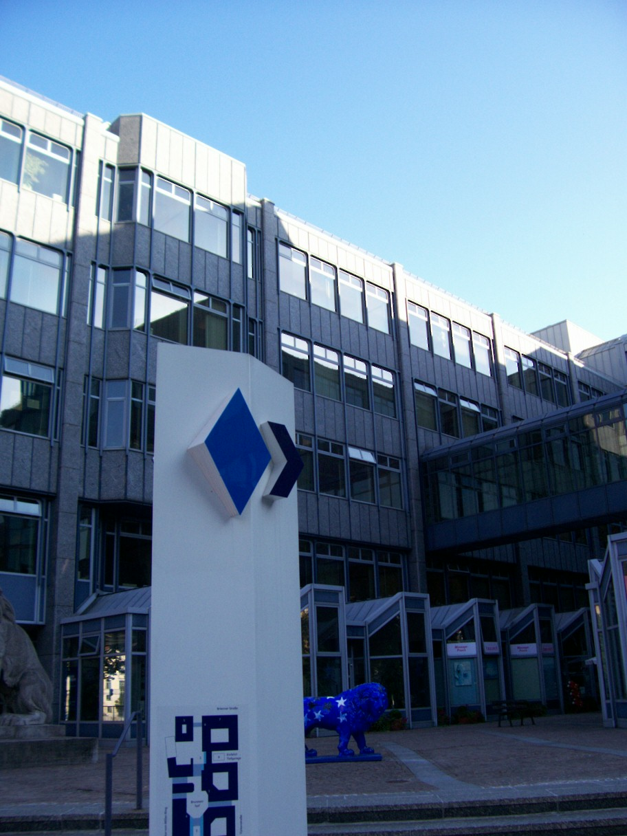 Bayerische Landesbank in Munich, Bavaria